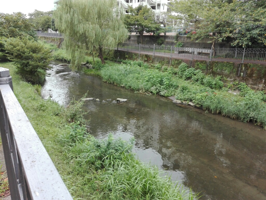 2017年9月に撮影されたいたち川の写真